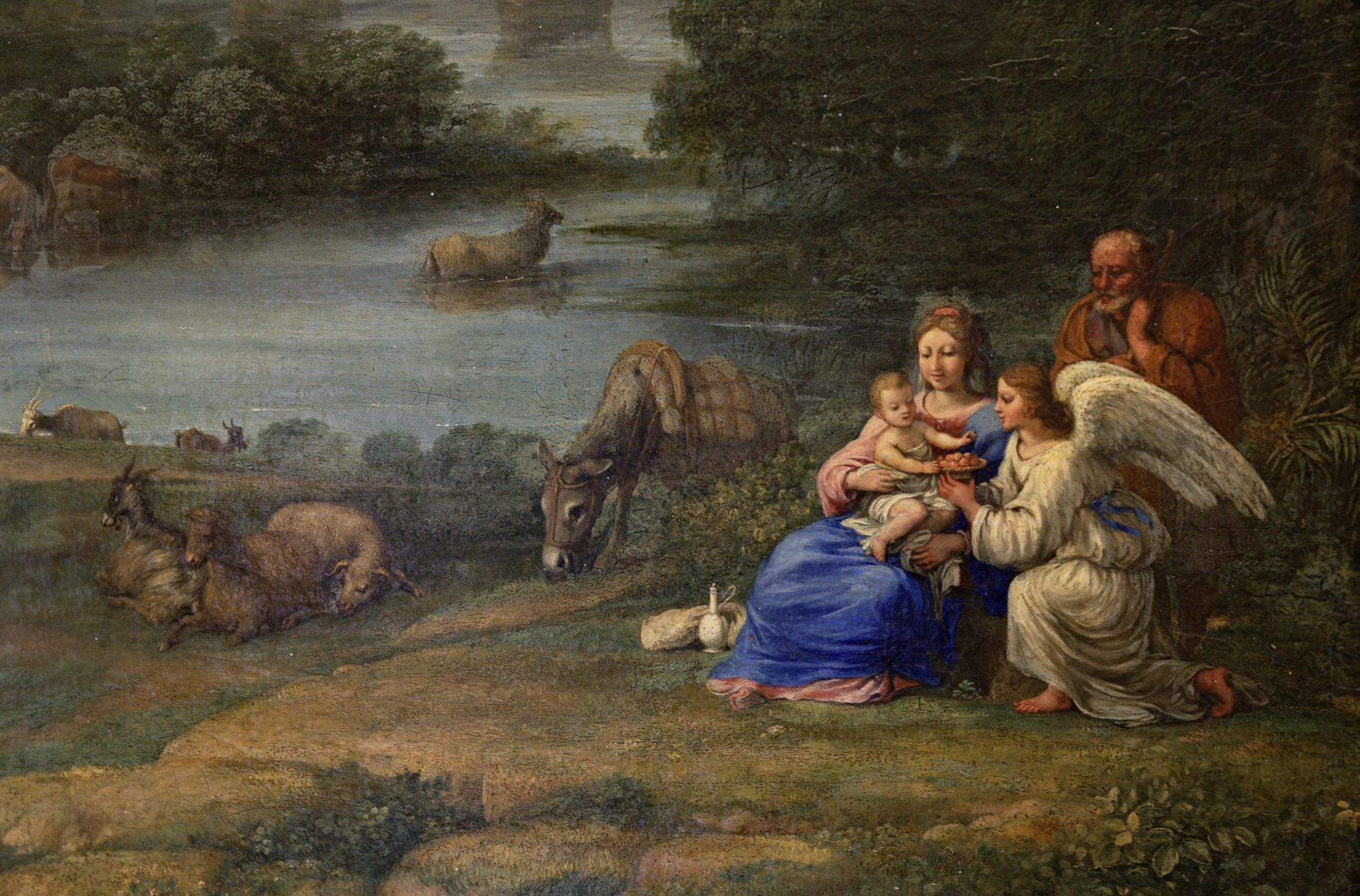 Détail d'un tableau de Claude Gellée dit le Lorrain : paysage avec la sainte famille durant la fuite en Égypte. Musée de l'Ermitage, Saint-Petersbourg, Russie.